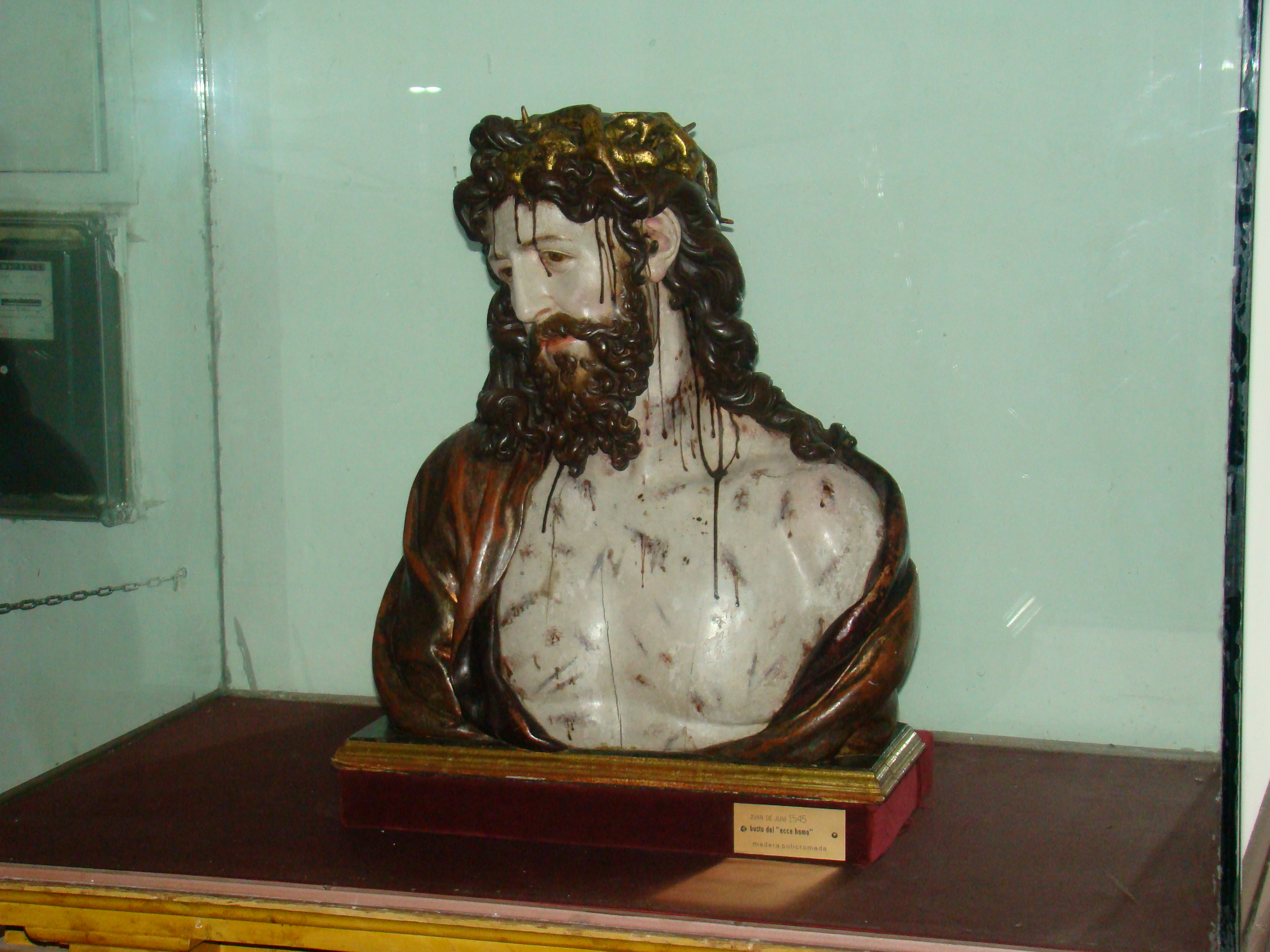 Ecce Homo del escultor Juan de Juni (1506-1577), de la escuela castellana. La obra se encuentra en el vestíbulo del Museo Catedralicio de Valladolid (España).